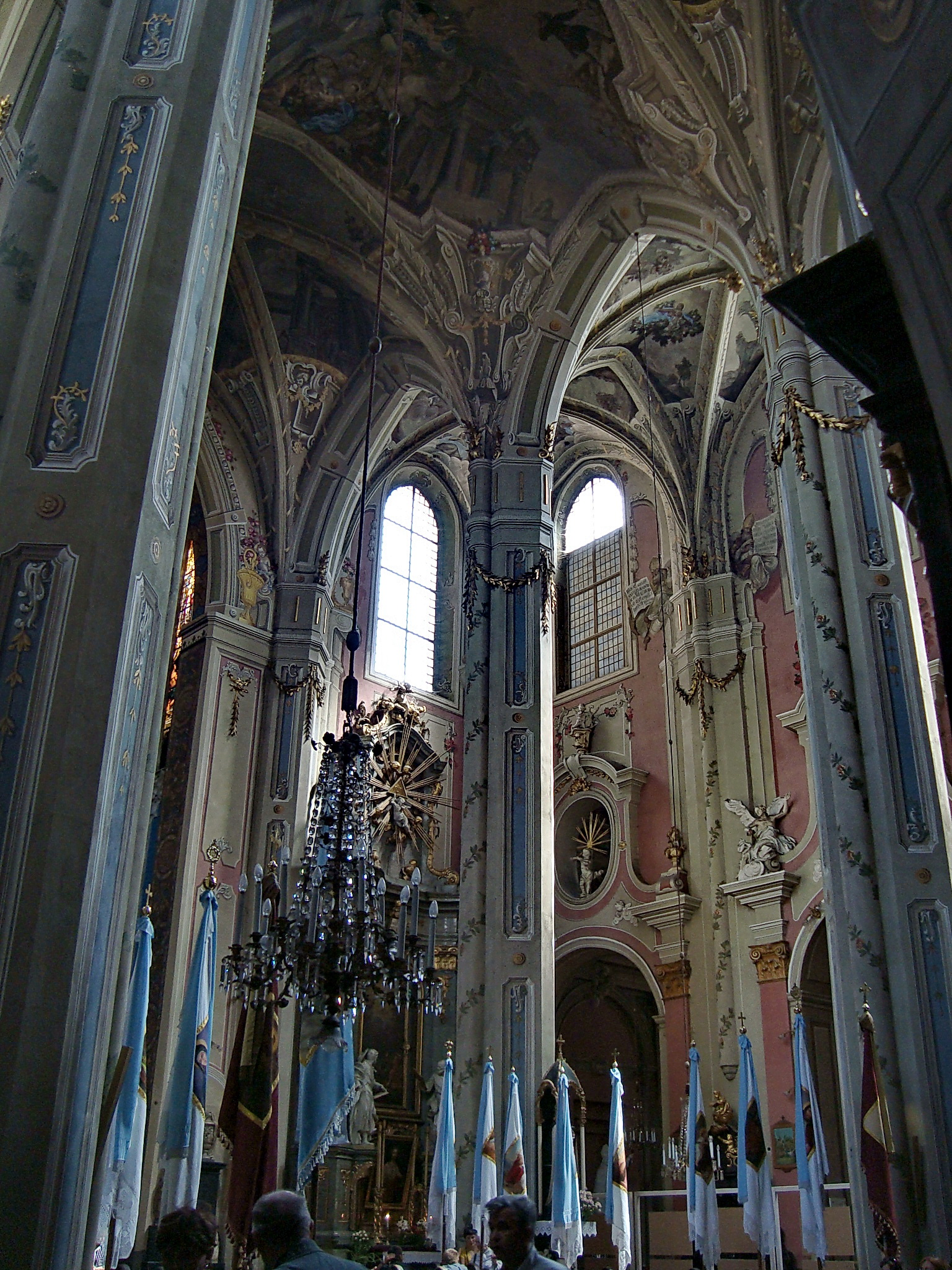 собор Кафедральний, Львів, Катедральна пл., 1